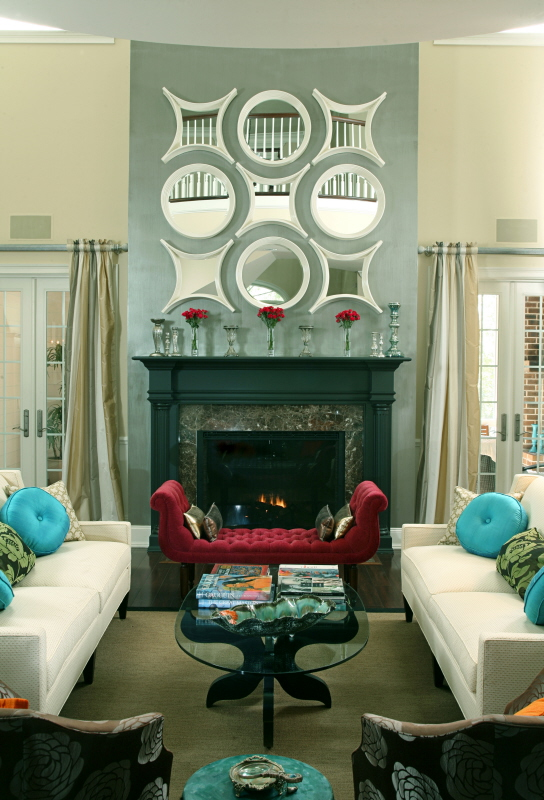 Hollywood Regency style room